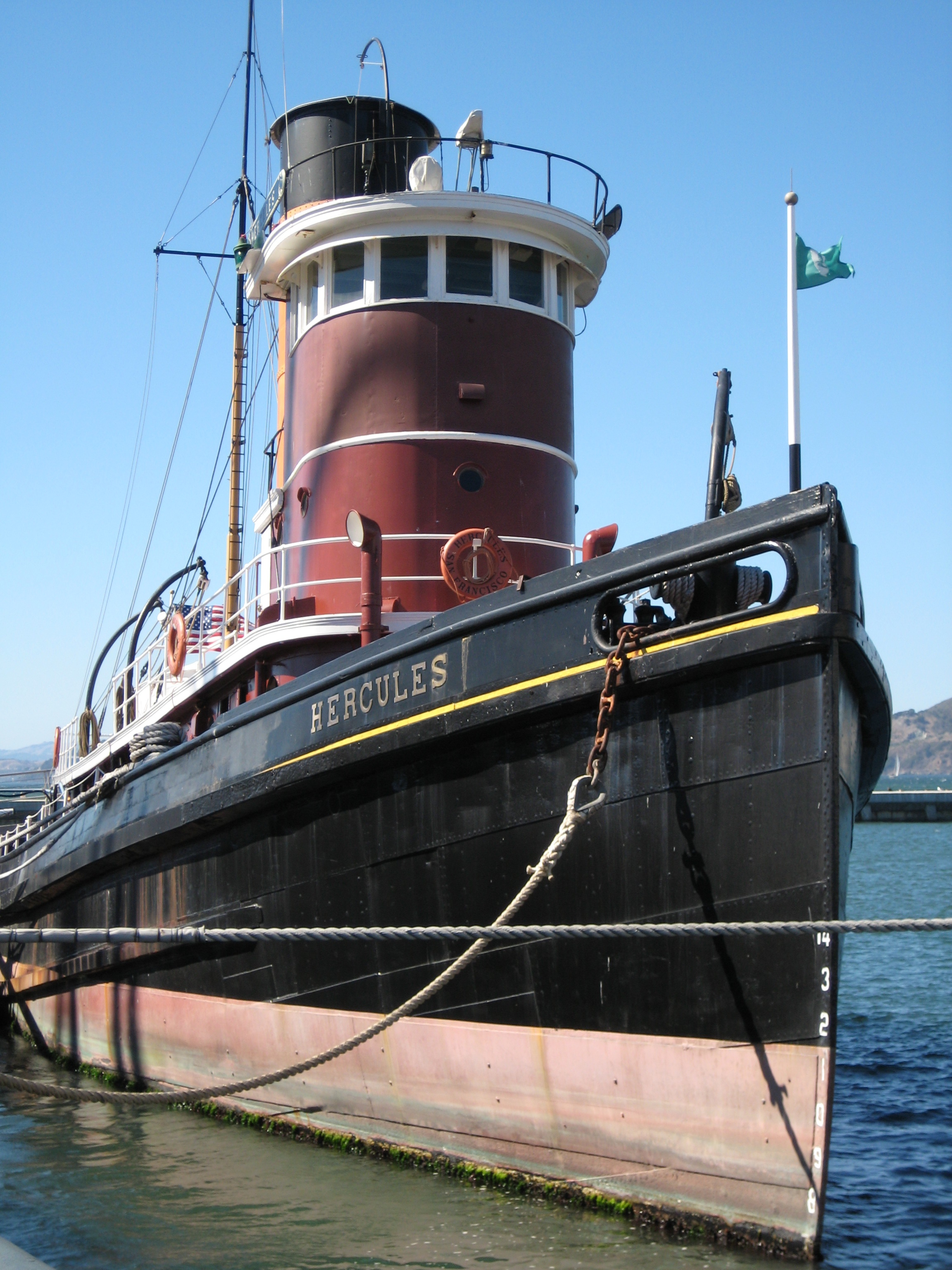 Le remorqueur américain Hercules (1941) - Musée maritime de San Francisco